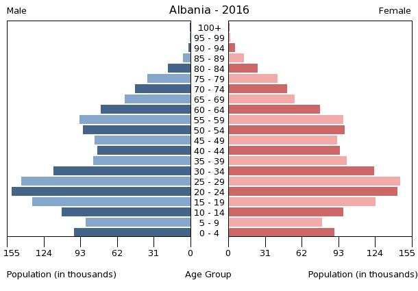 A population pyramid illustrates the age and sex structure of a country's population and may provide insights about political and social stability, as well as economic development. The population is distributed along the horizontal axis, with males shown on the left and females on the right. The male and female populations are broken down into 5-year age groups represented as horizontal bars along the vertical axis, with the youngest age groups at the bottom and the oldest at the top. The shape of the population pyramid gradually evolves over time based on fertility, mortality, and international migration trends.